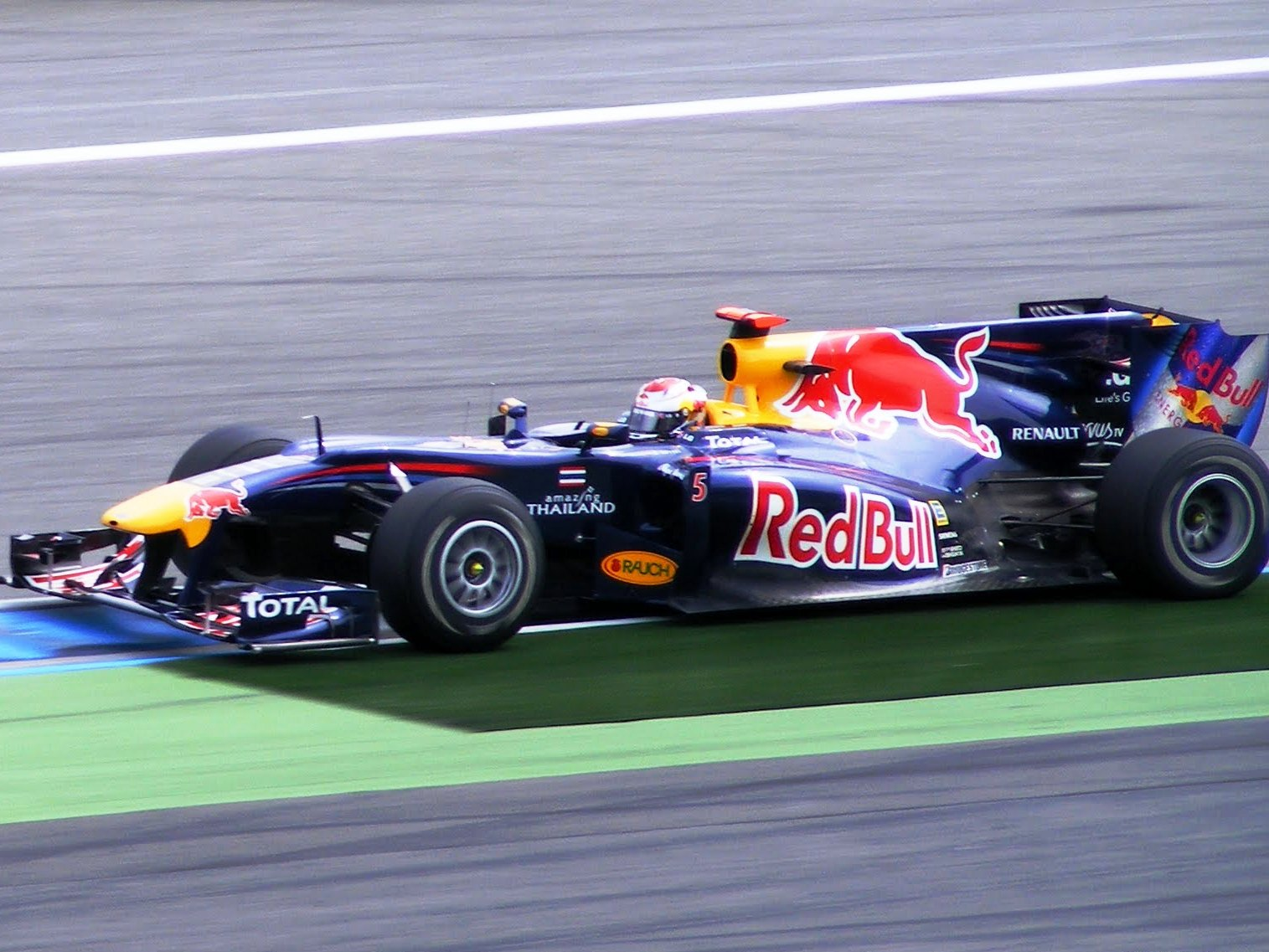 Sebastian Vettel auf dem Hockenheimring